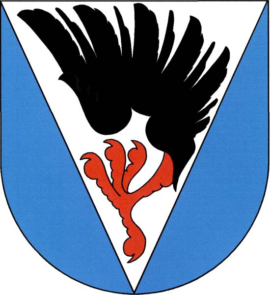 Znak obce Soutice